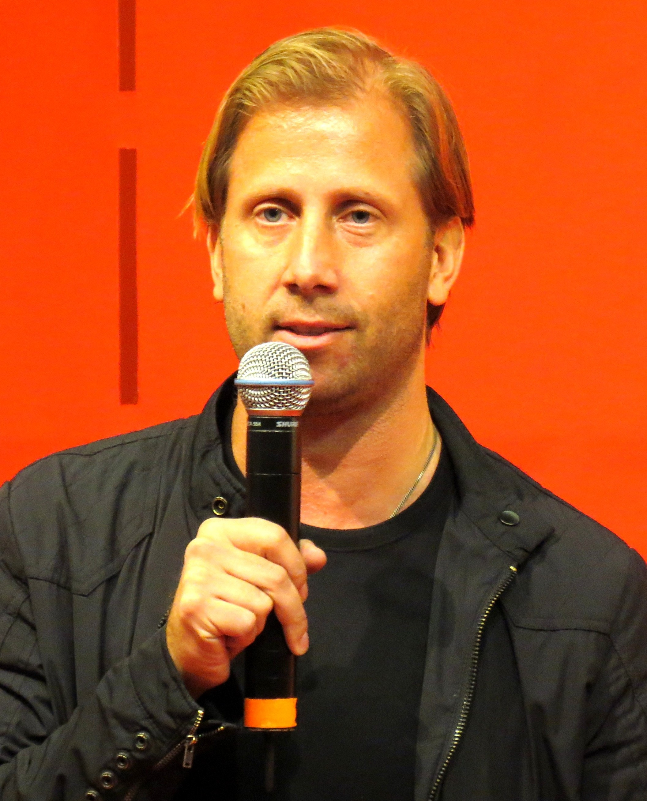 Simon Bank, sportjournalist på Aftonbladets Sportbladet.